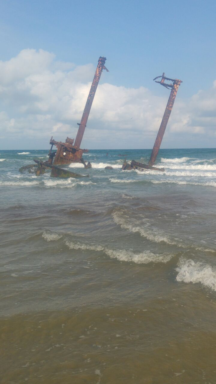 Navio Altair em janeiro de 2017.